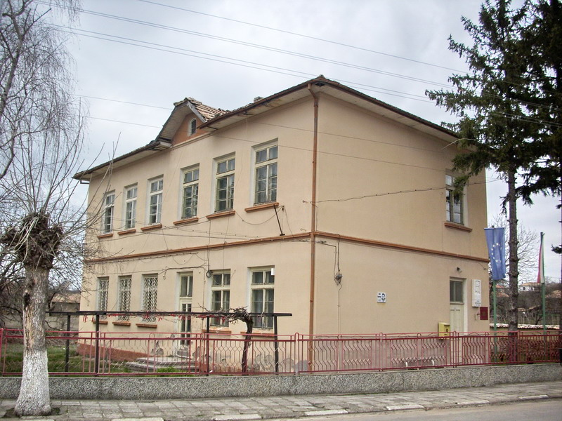 Село Берковски, община Попово. Кметството.